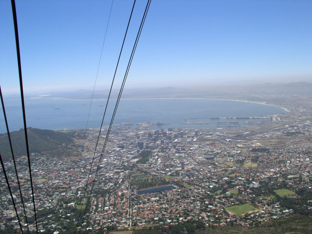 Вид на Кейптаун с просмотровой площадки Столовой Горы